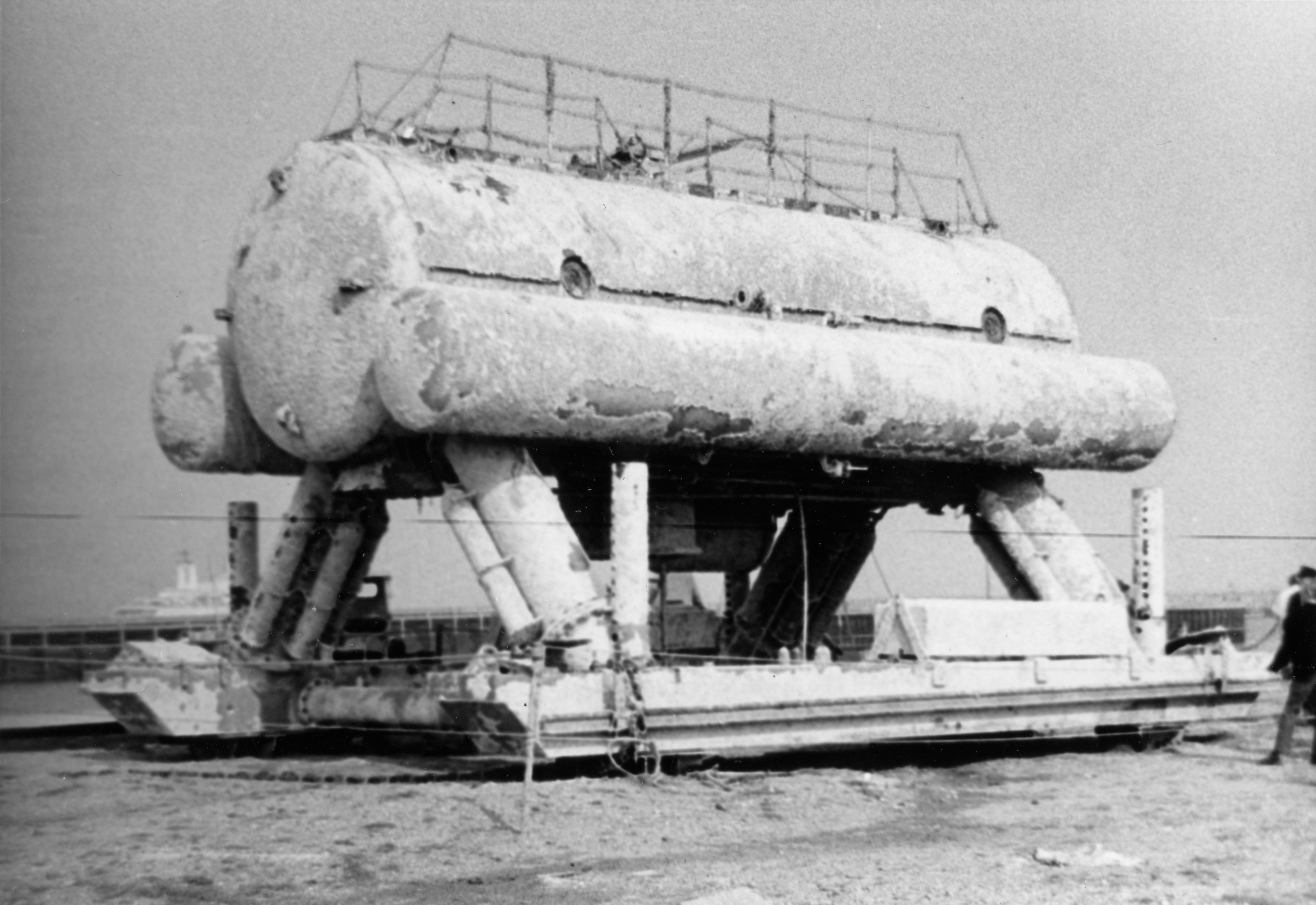 Unterwasserlabor "Helgoland", aufgenommen auf Helgoland mit einer sehr einfachen Kamera